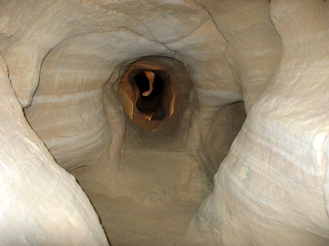 tunnel.